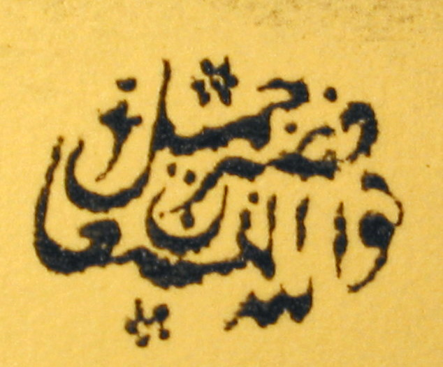 Persönliches Siegel des Orientalisten Ignaz Goldziher auf einem Brief aus Juni 1889 (Reproduktion)